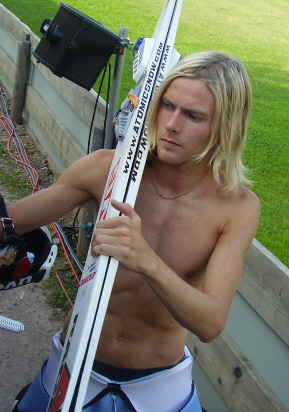 Bjørn Einar Romøren während der Qualifikation am 25.07.2008 beim Sommergrandprix in Hinterzarten